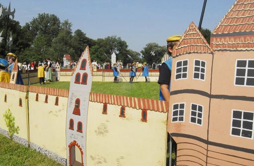 Schwäbischwerder Kindertag in Donauwörth (Bayern). Jährlich im Juli mit Festumzug und Historienspiel zur Stadtgeschichte. Findet alle zwei Jahre statt